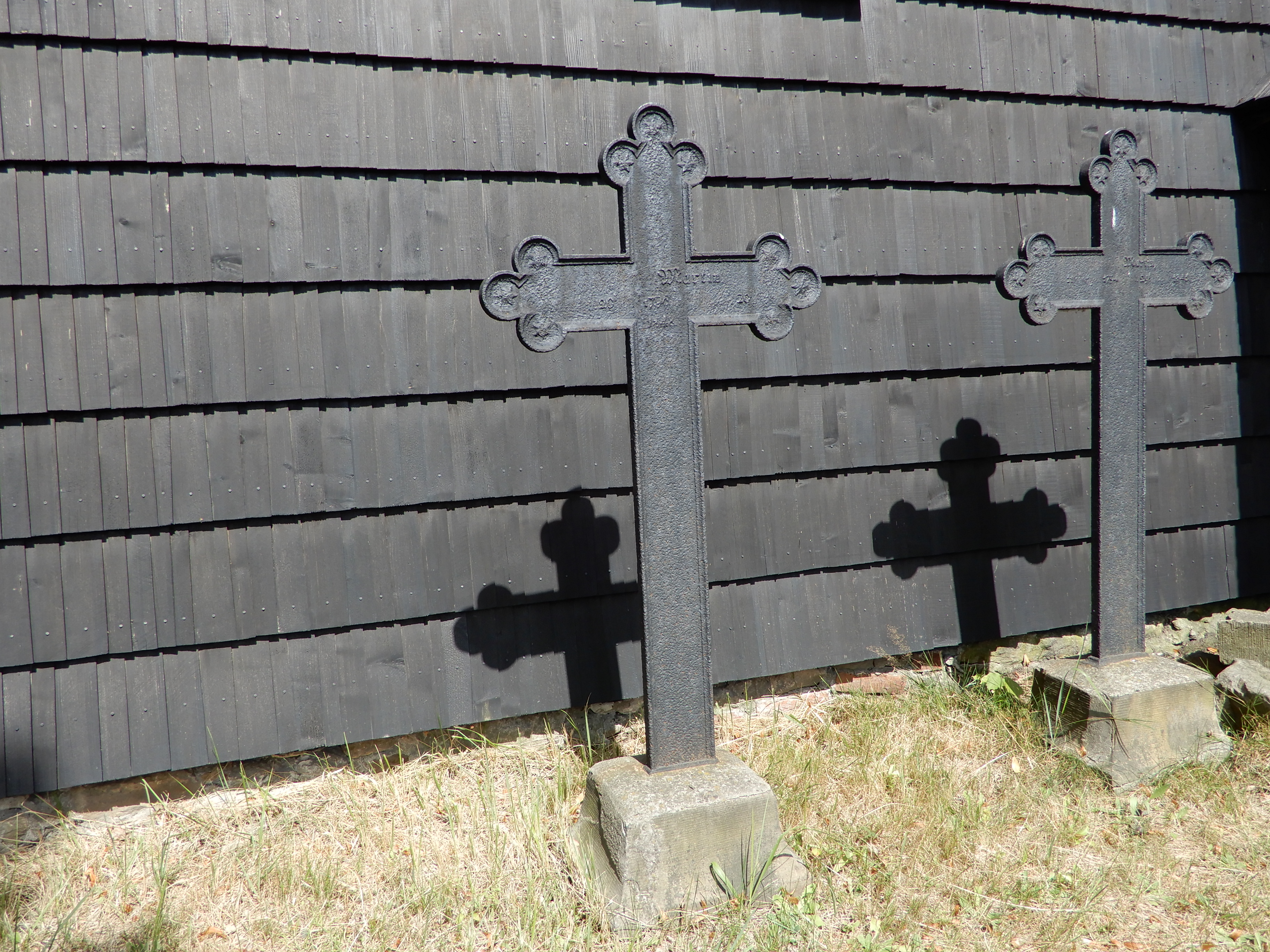 Stary cmentarz przy kościele św. Marii Magdaleny w Bełku - nagrobki rodziny Martin